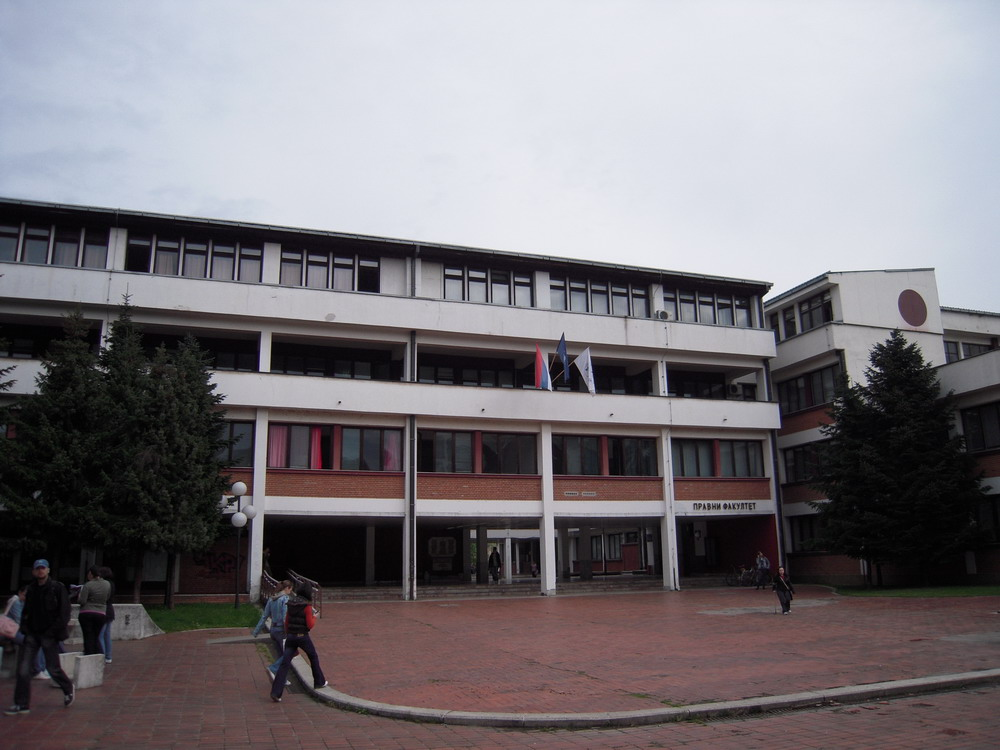 Pravni fakultet u Banjoj Luci.